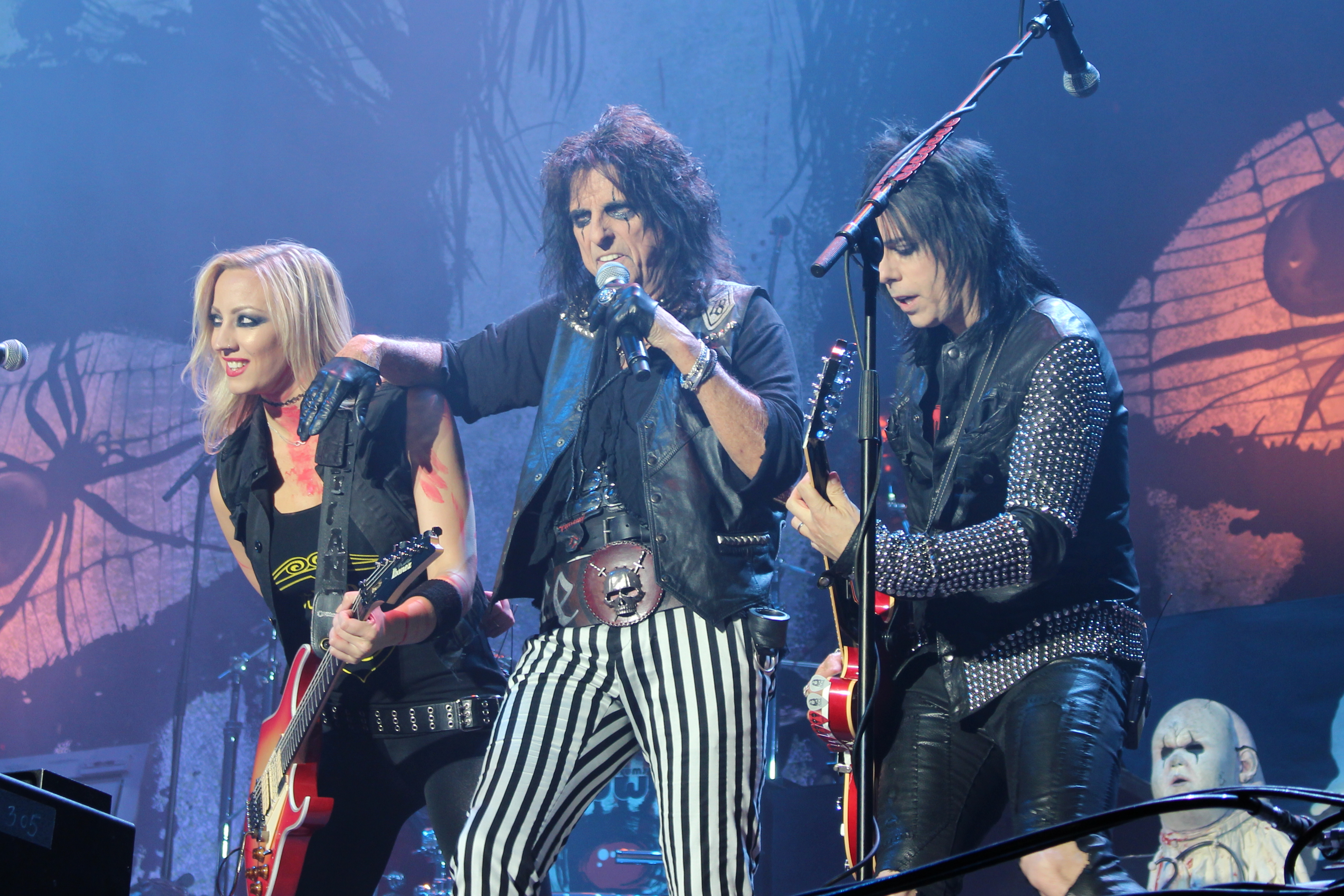 Festivalsommer This photo was created with the support of donations to Wikimedia Deutschland in the context of the CPB project "Festival Summer". Personality rights warningAlthough this work is freely licensed or in the public domain, the person(s) shown may have rights that legally restrict certain re-uses unless those depicted consent to such uses. In these cases, a model release or other evidence of consent could protect you from infringement claims.